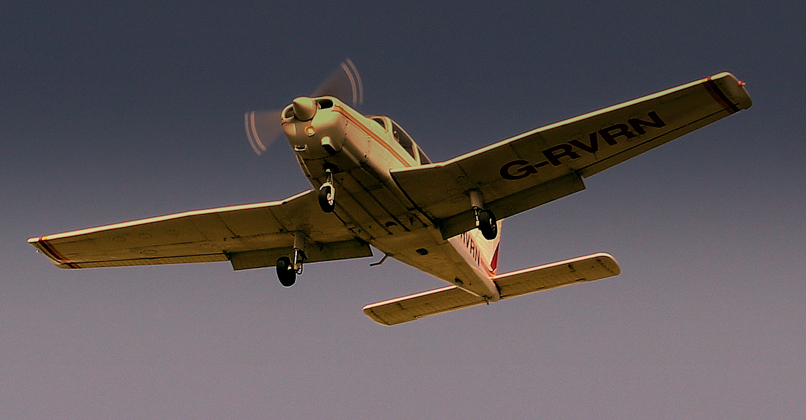 G-RVRN PA28 CHEROKEE OF RAVENAIR LANDING ON RUNWAY 27 AT LIVERPOOL JOHN LENNON AIRPORT MAY 2013